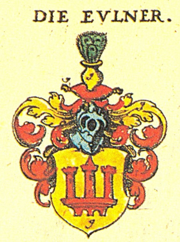 Ritterschaft und Adel in Franken Die Eulner (Ulner von Dieburg)